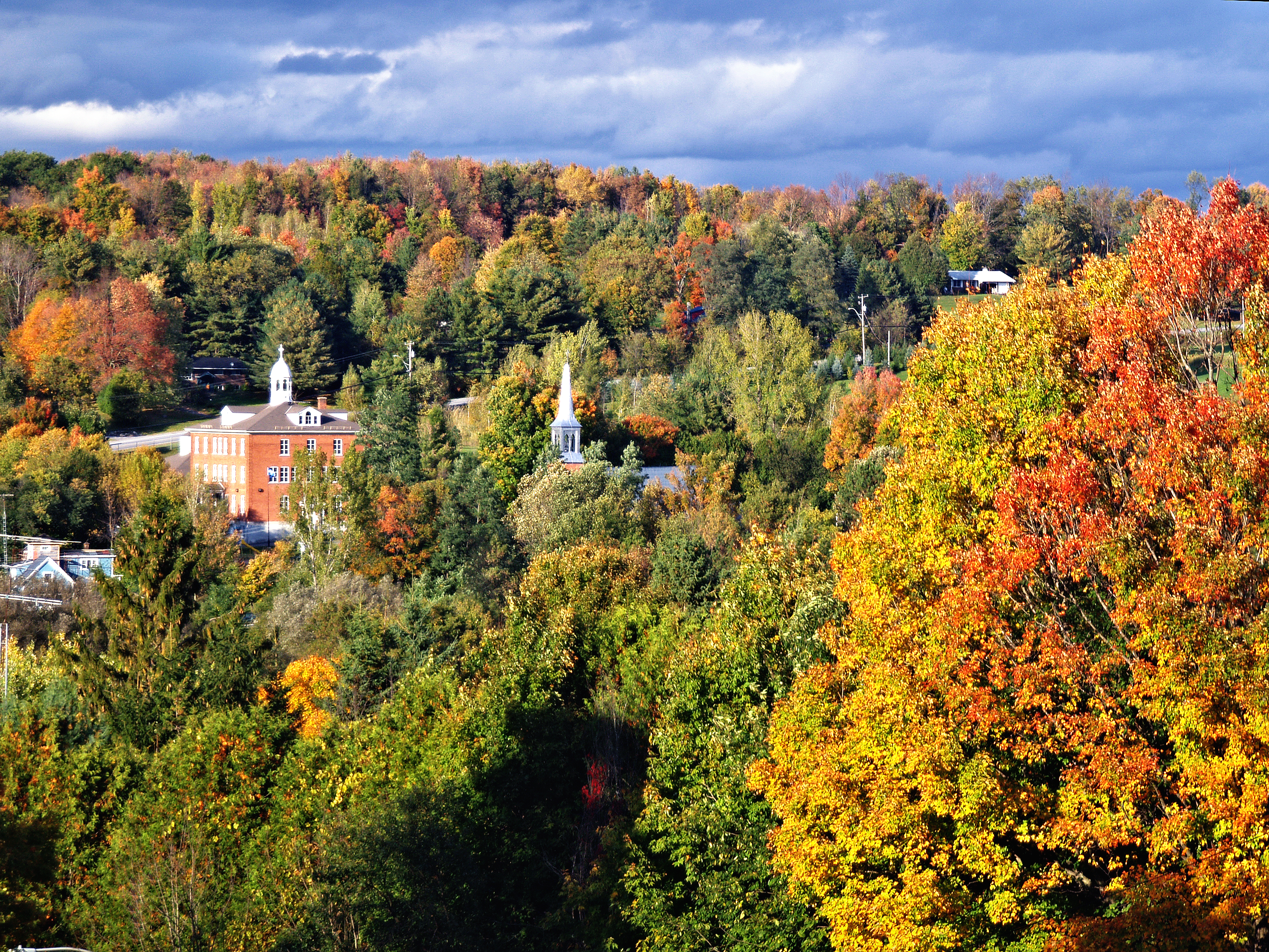 Frelighsburg - Automne 2008 Saint-François d'Assise